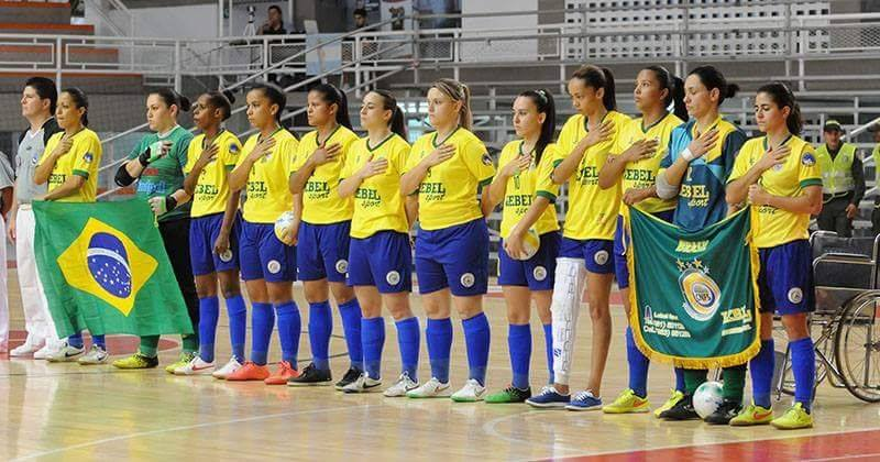 Seleção Brasileira de Futebol de Salão (CNFS) no Sul-Americano em Cali, na Colômbia em 2015.